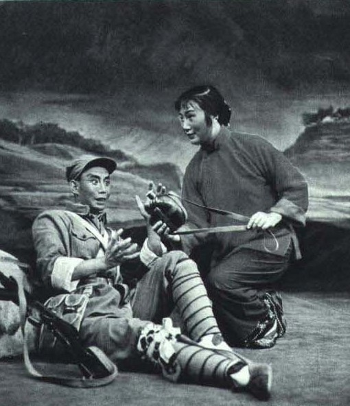 1964-09 1964年 红嫂